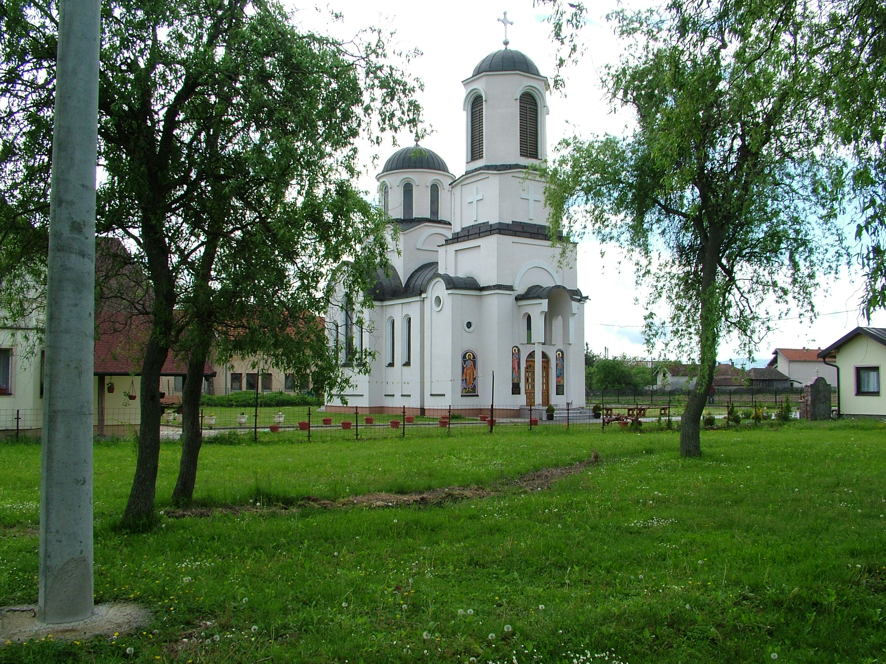 Аутор Драган Радић. Фотографисано је из дворишта Основне школе "Ћирило и Методије" Главичице